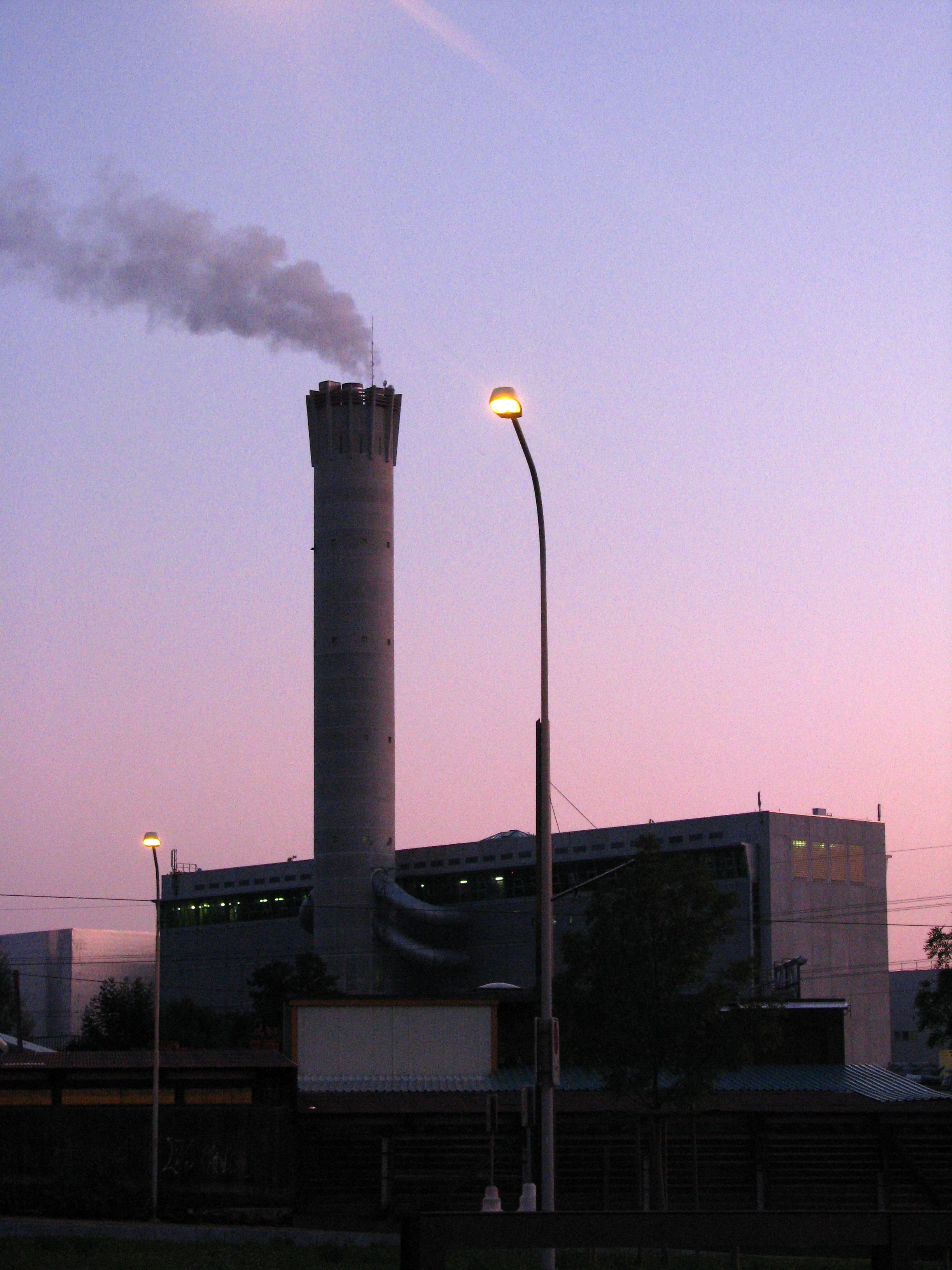 KVA Hagenholz building in Zürich-Oerlikon (Switzerland)